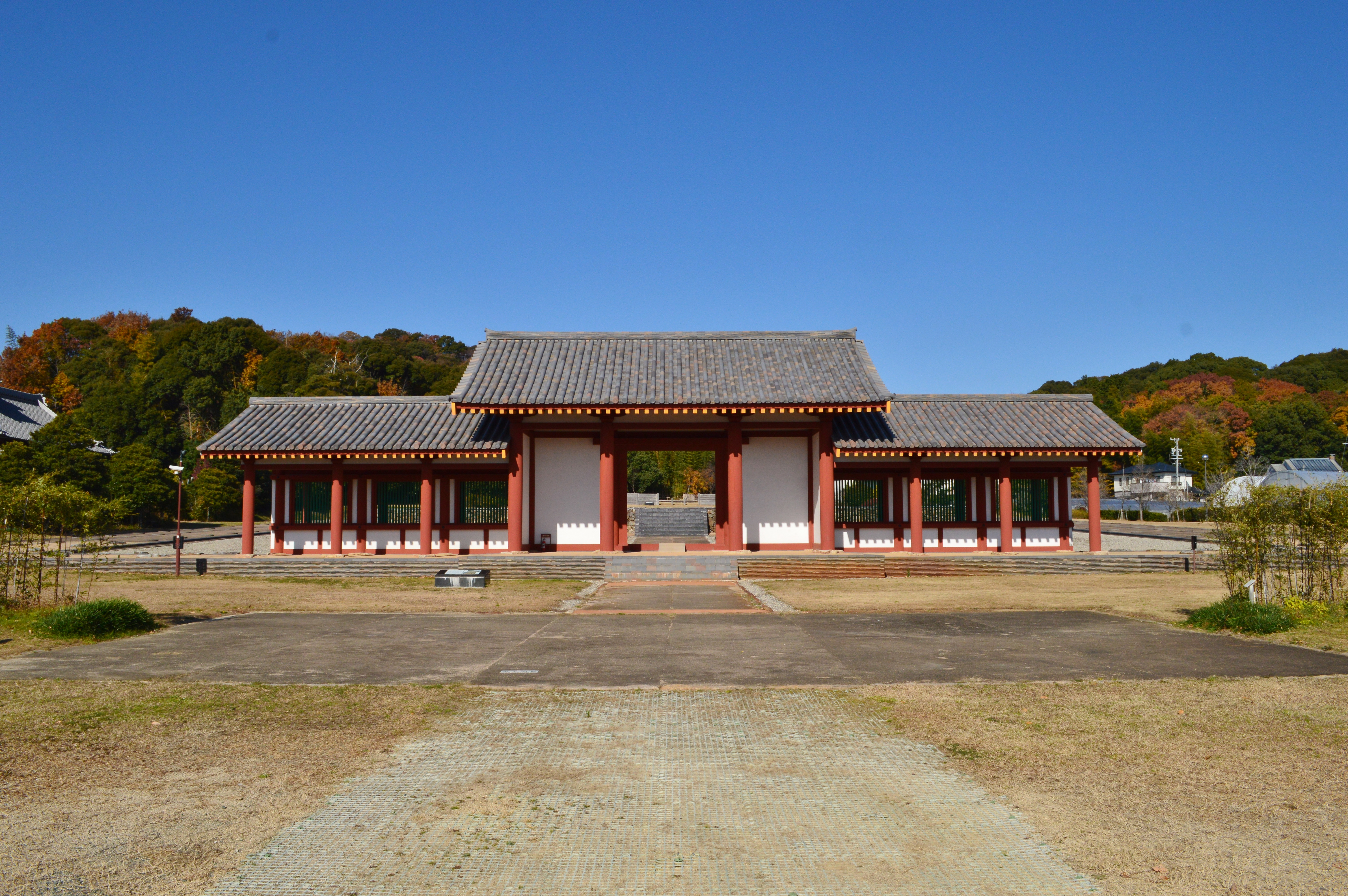 三河国分尼寺跡 南大門跡から中門を望む